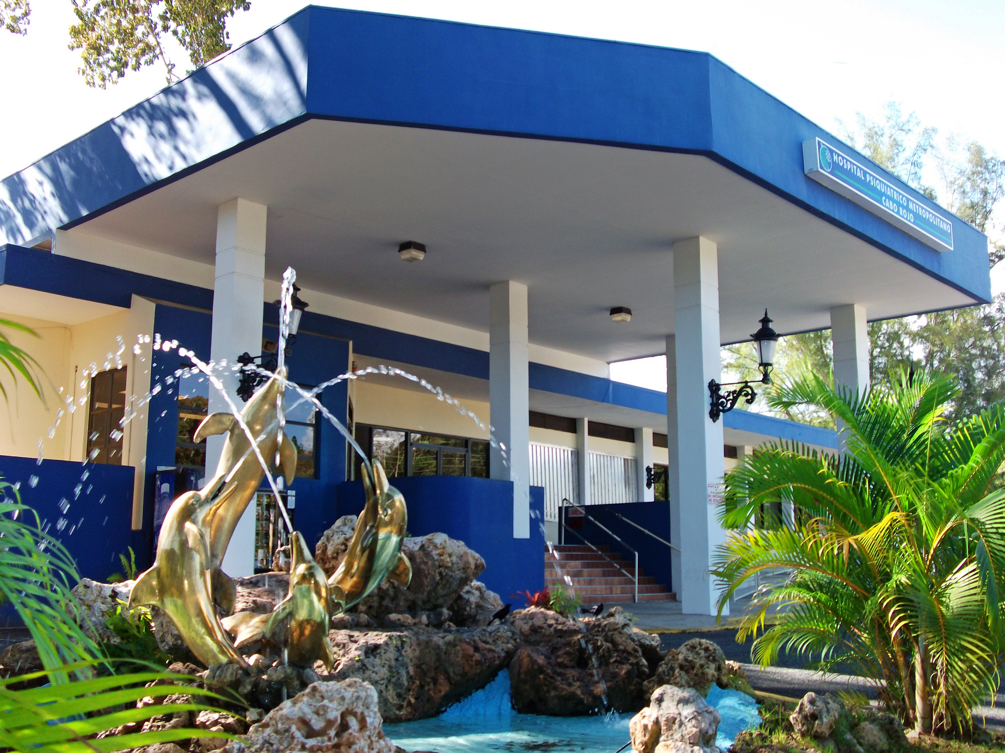 Hospital Psiquiátrico Metropolitano.